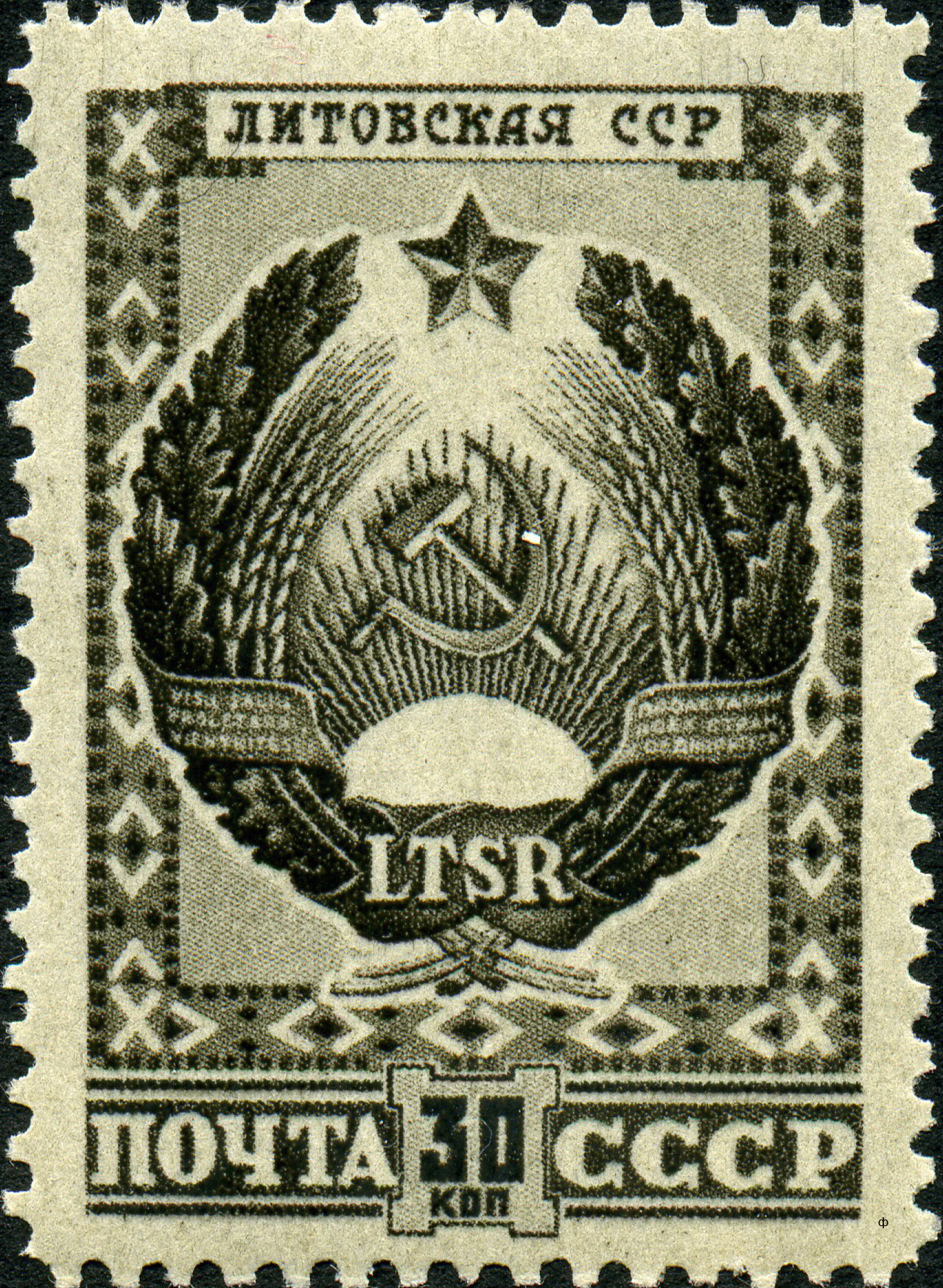 Марка СССР